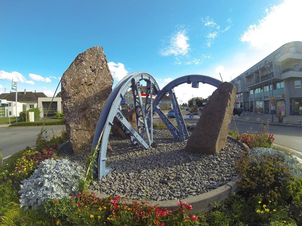 Rond Point Wittenheim centre Photo offerte par dont Webcreators est l'éditeur à la communauté Wikipedia